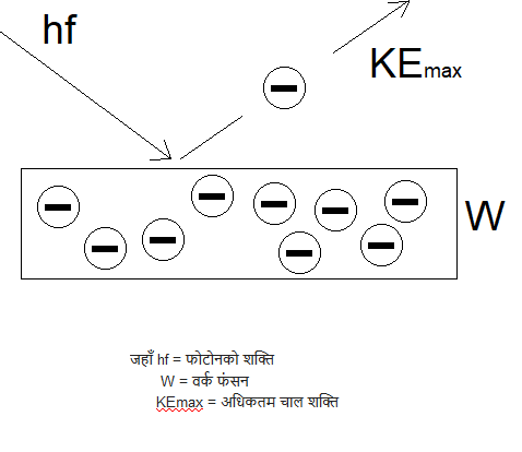 नेपाली: प्रकाश विद्युत प्रभाव